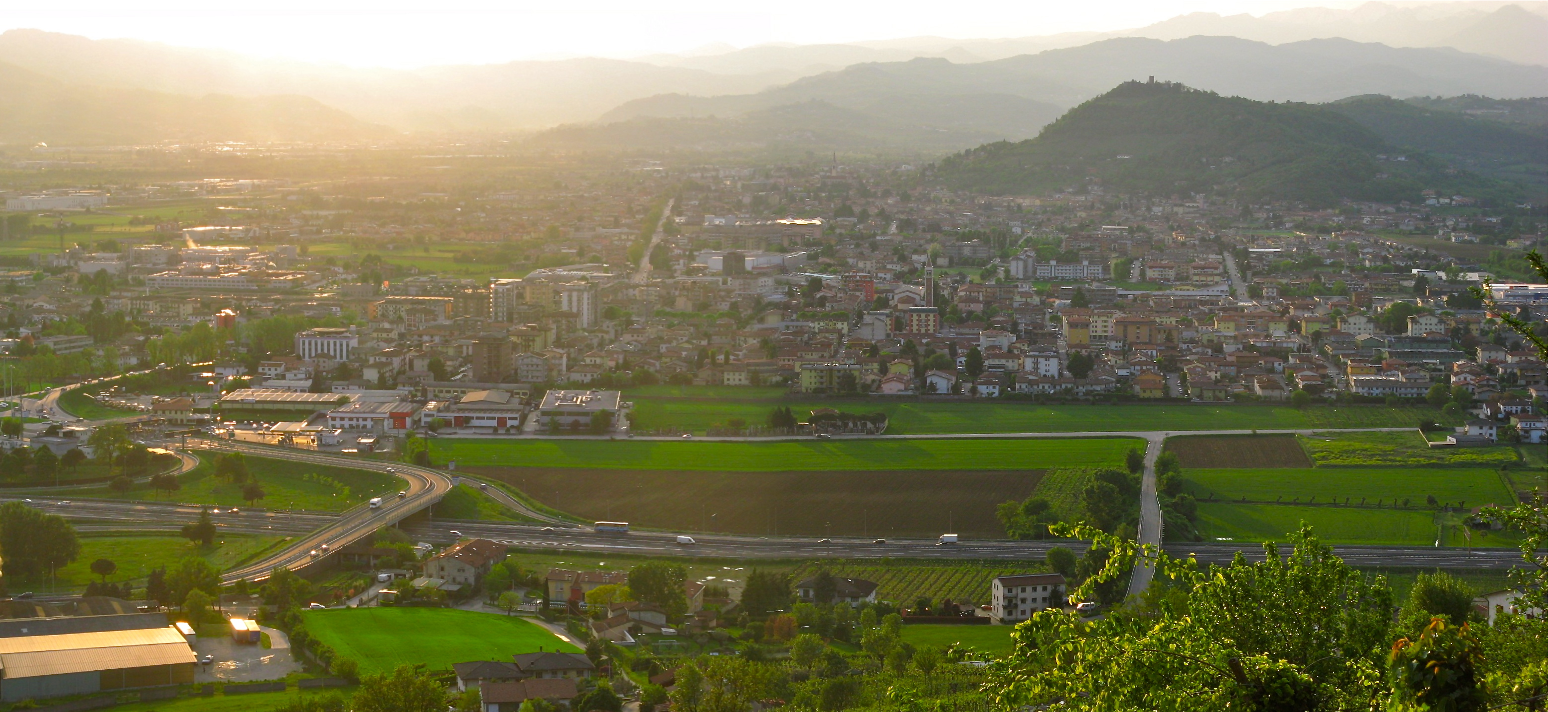 Vista sul conglomerato urbano di Montecchio Maggiore e Alte Ceccato; scattata da me.